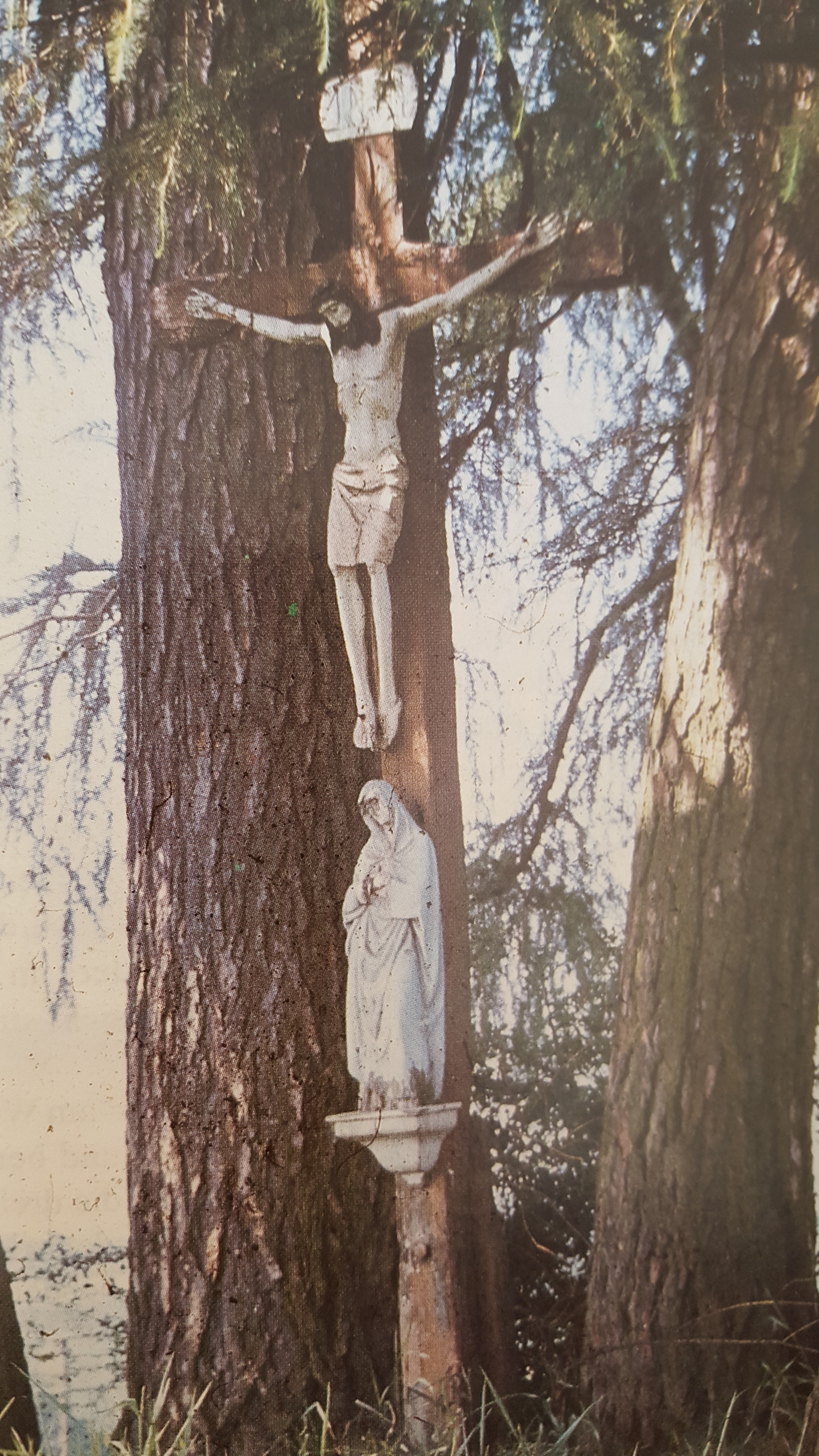 Das Kreuz wurde 1850 zu Ehren dreier im Schwedenkrieg ermordeter Landwirte erstellt und 1980 wegen Diebstahlgefahr entfernt.